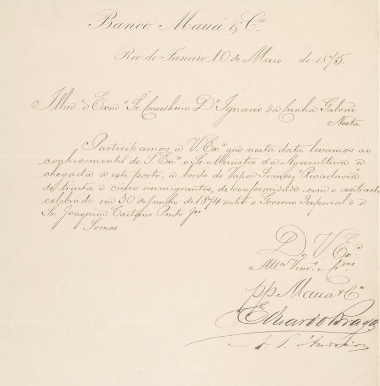 Carta do Banco Mauá endereçada ao conselheiro Inácio da Cunha Galvão comunicando a chegada de 35 italianos ao porto do Rio de Janeiro, em conformidade com o contrato estabelecido pelo governo imperial em 1874 para a vinda de europeus. O vapor Rivadavia foi o primeiro a transportar imigrantes subsidiados. Fundo: Inspetoria Geral de Terras e Colonização.